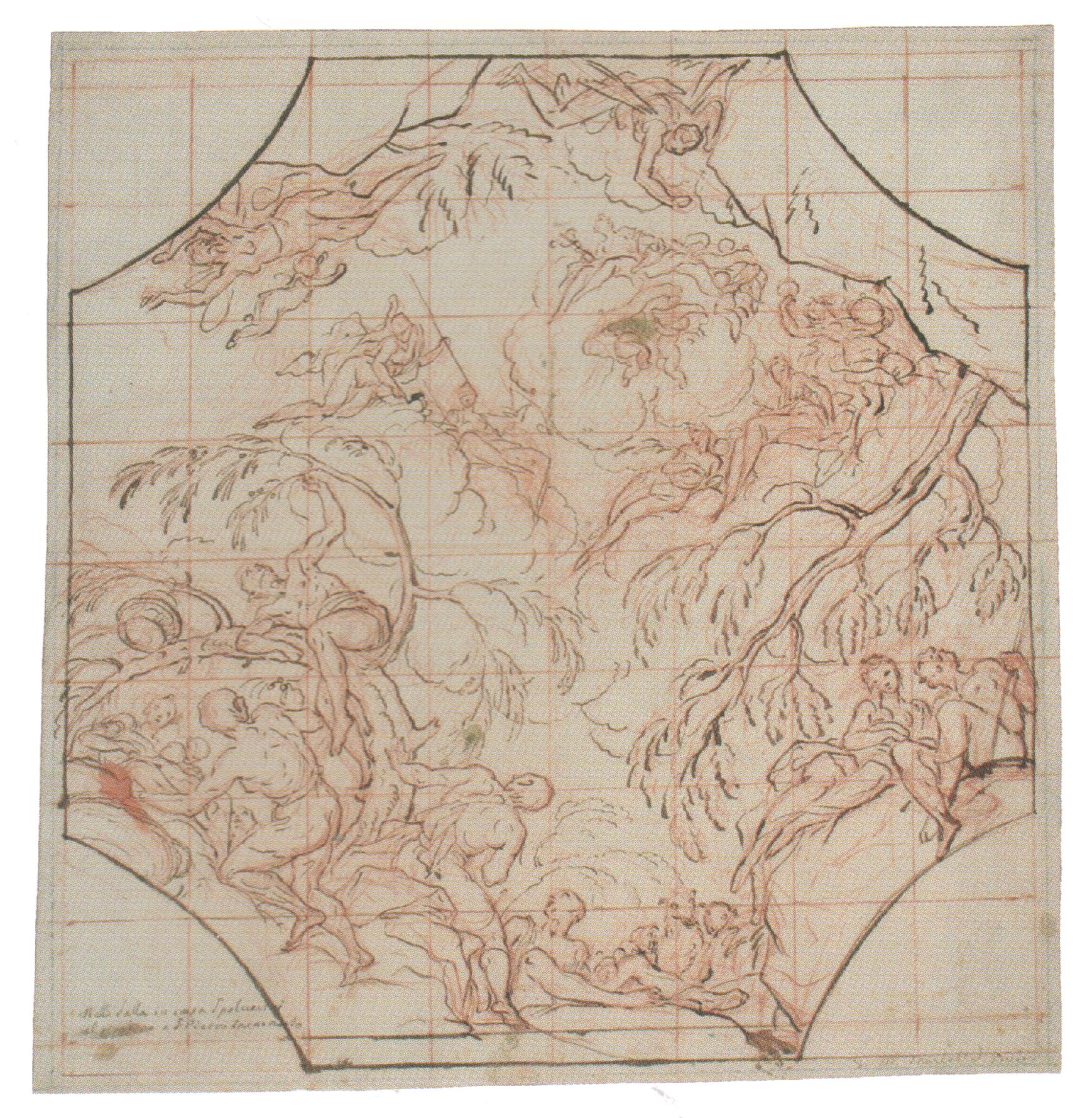 Kabinet grafike HAZU